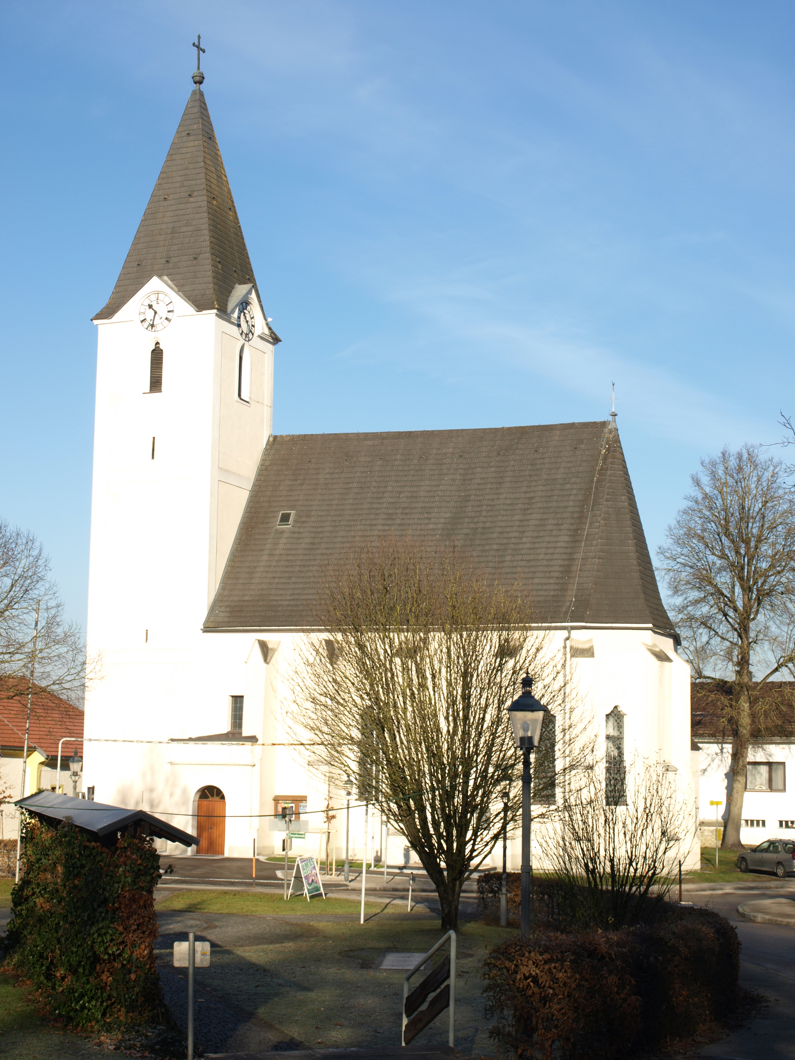 Kath. Pfarrkirche hl. Ruprecht